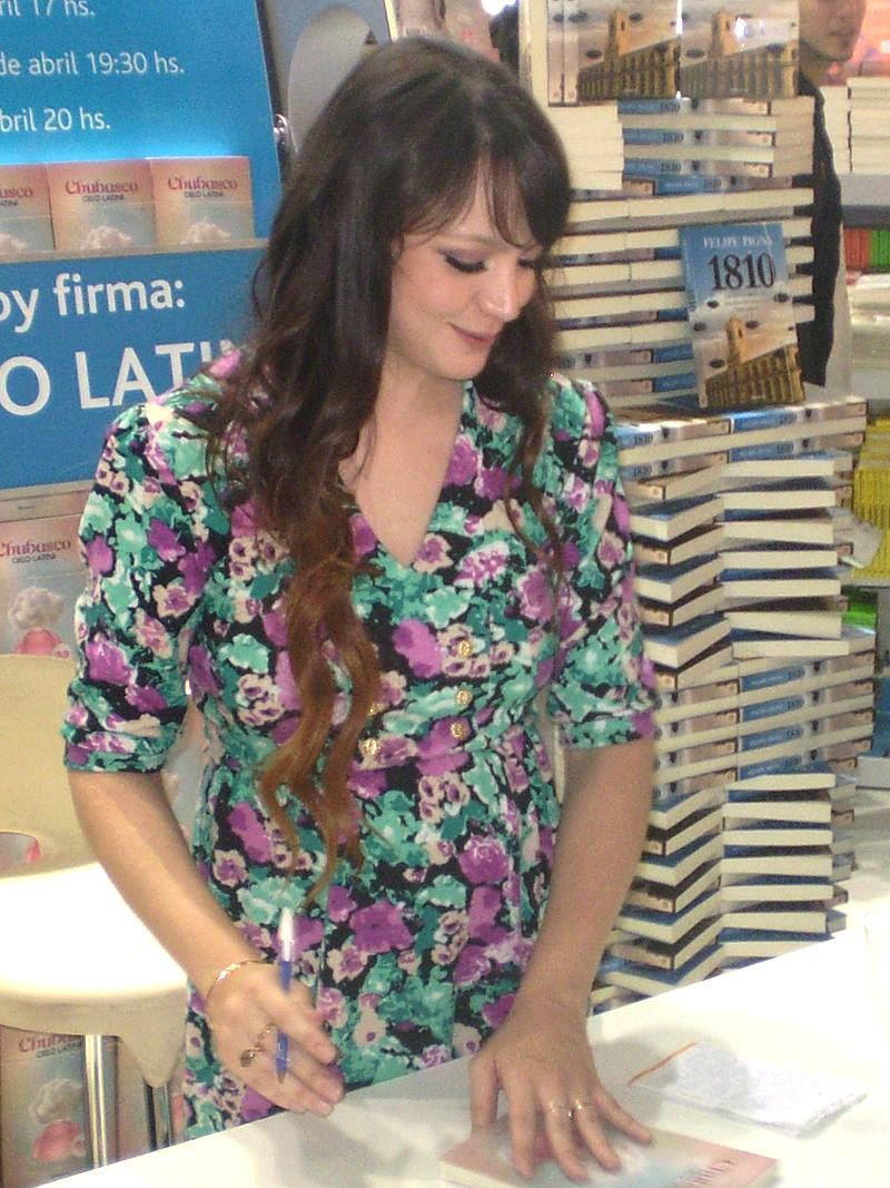 Cielo Latini en la Feria del Libro 2010